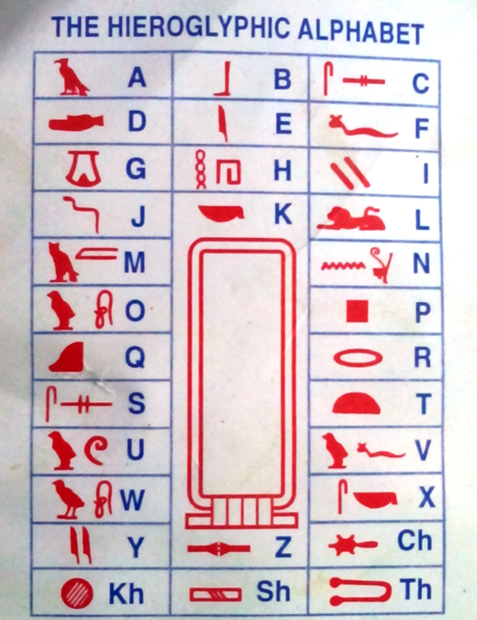 الهيروغليفية المصرية.